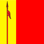 Хоругва смт Петрове